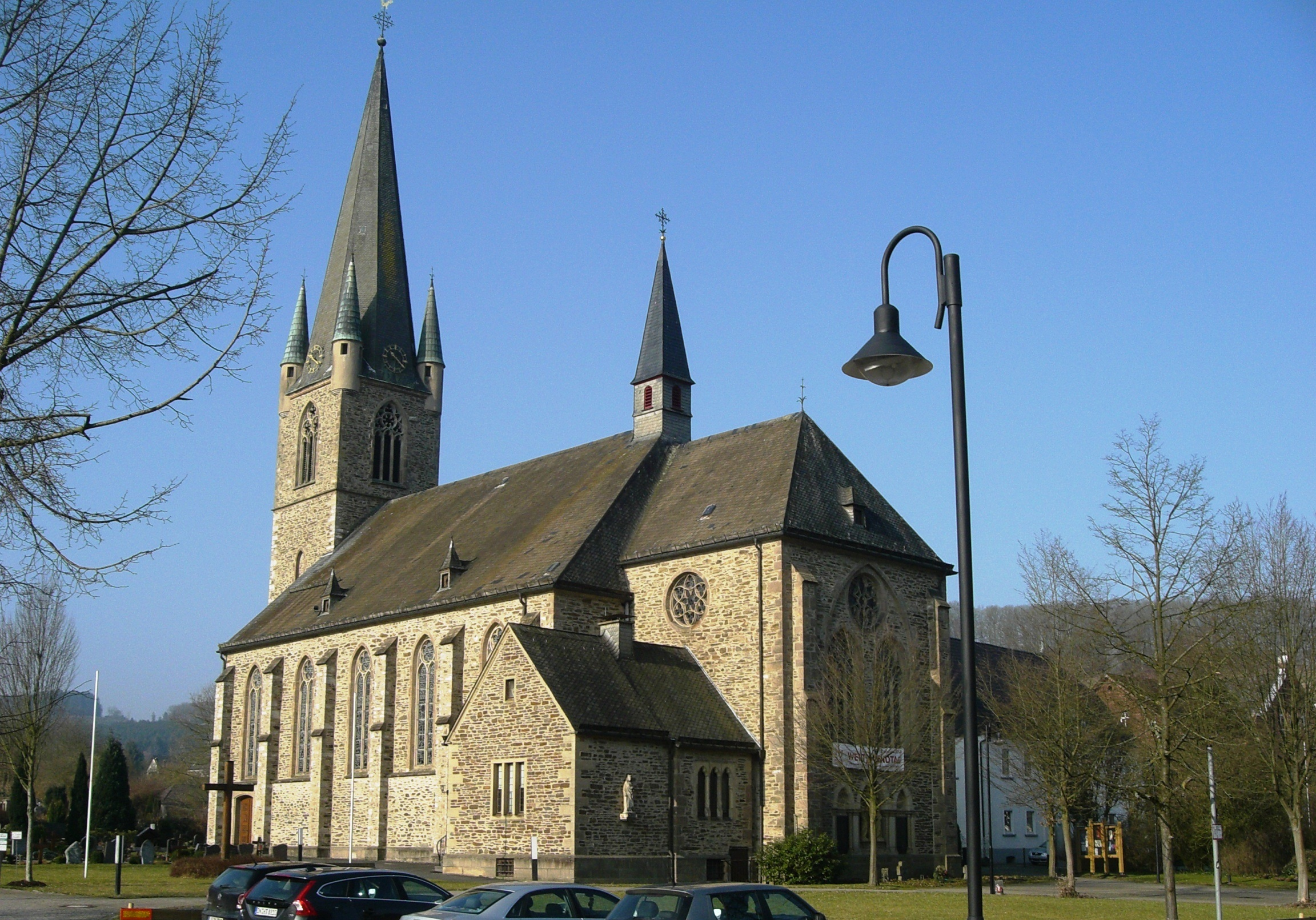 Pfarrkirche der kath. Kirchengemeinde in Grevenbrück (Baudenkmal)